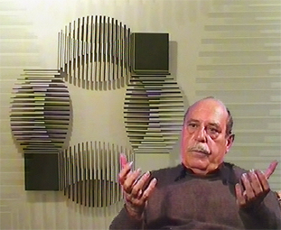 Portrait de Francisco Sobrino